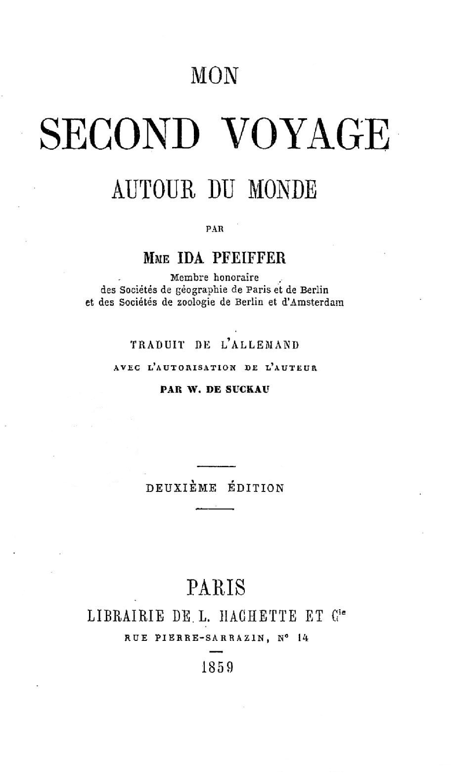 Page couverture du livre décrivant le 2e voyage autour du monde d'Ida Pfeiffer. Extrait du PDF du BNF Gallica. Effacé l'estampe de la bibiothèque impériale.